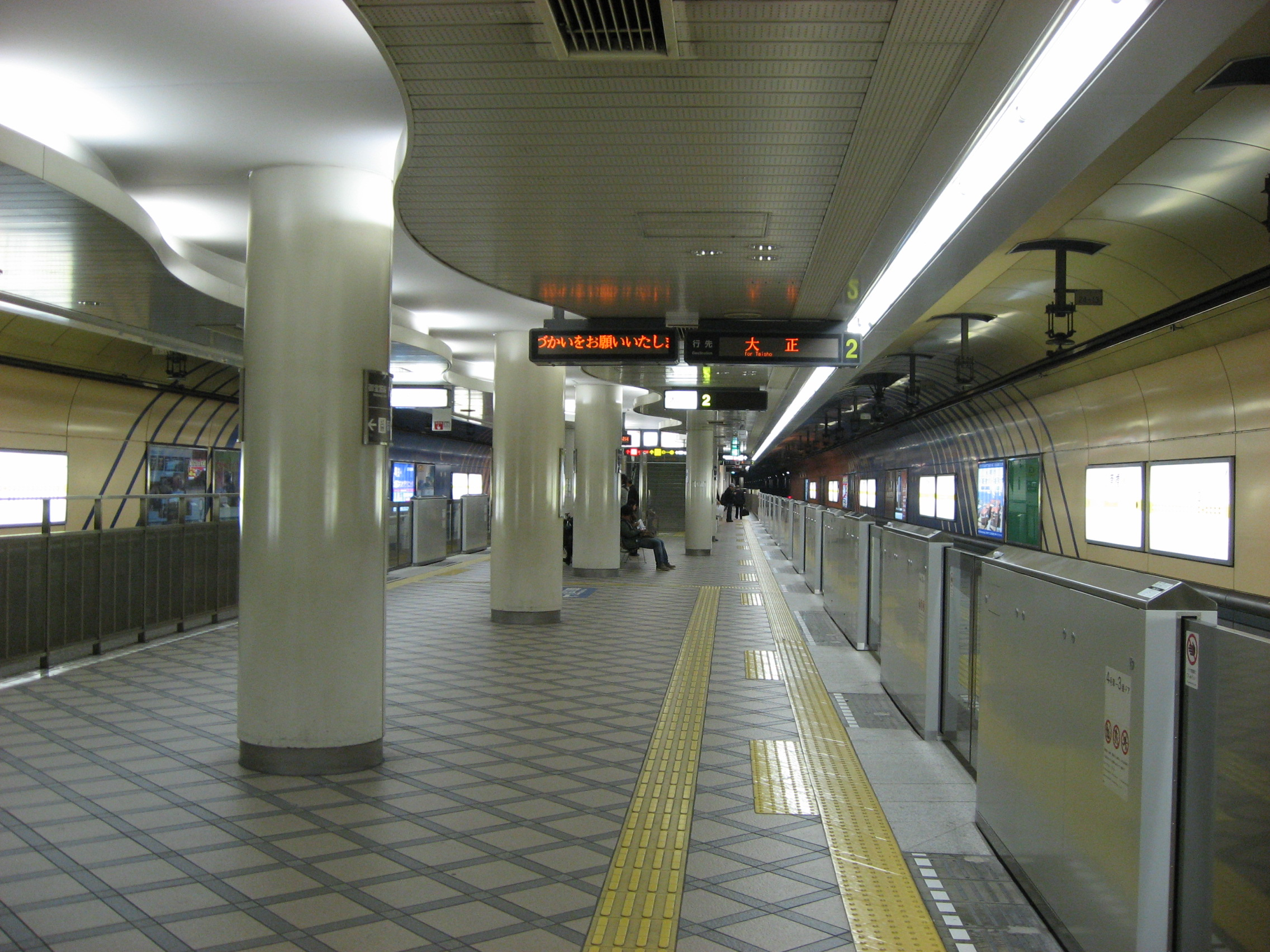 長堀鶴見緑地線心斎橋駅プラットホーム